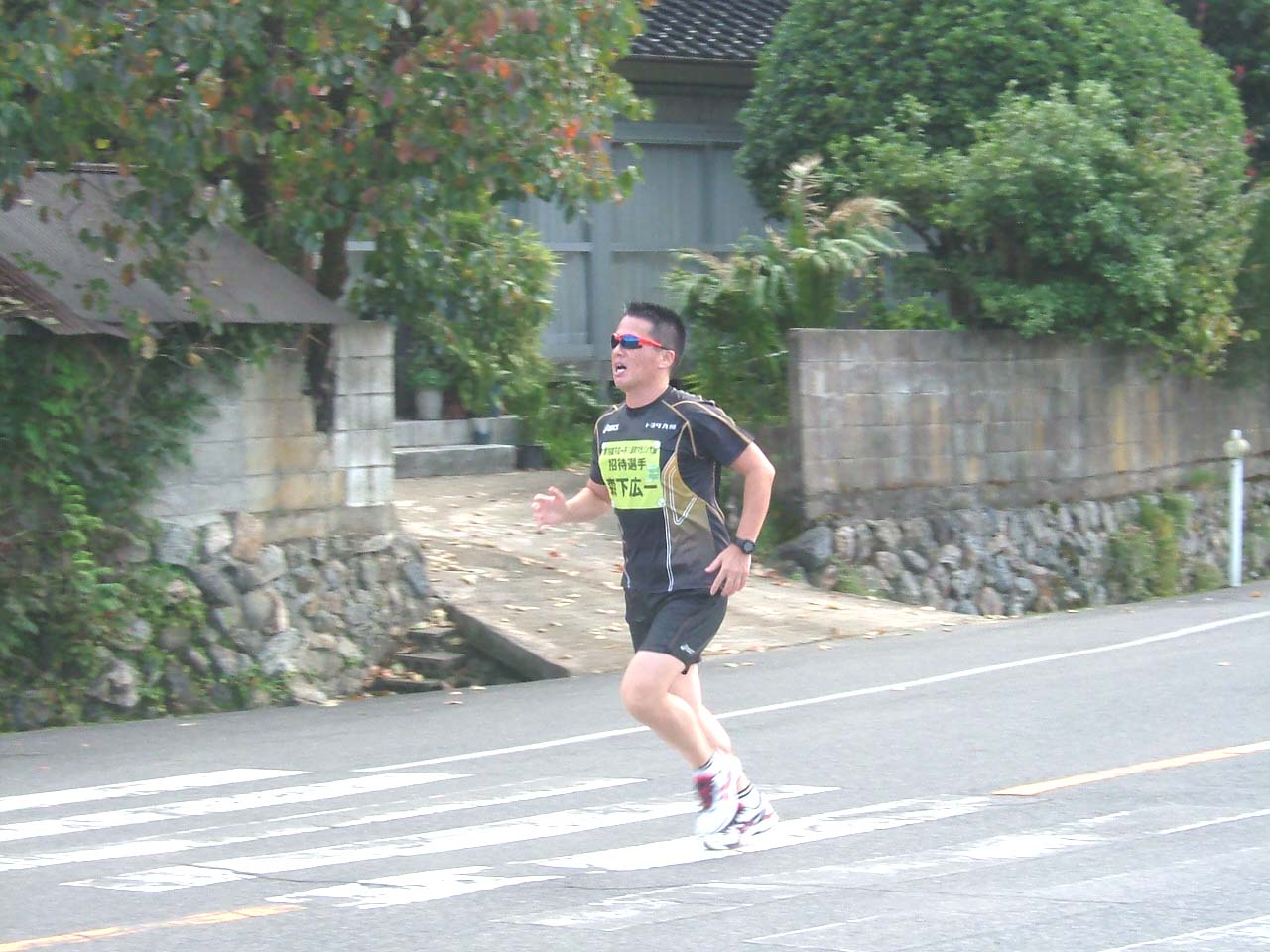 森下広一日本の元陸上選手